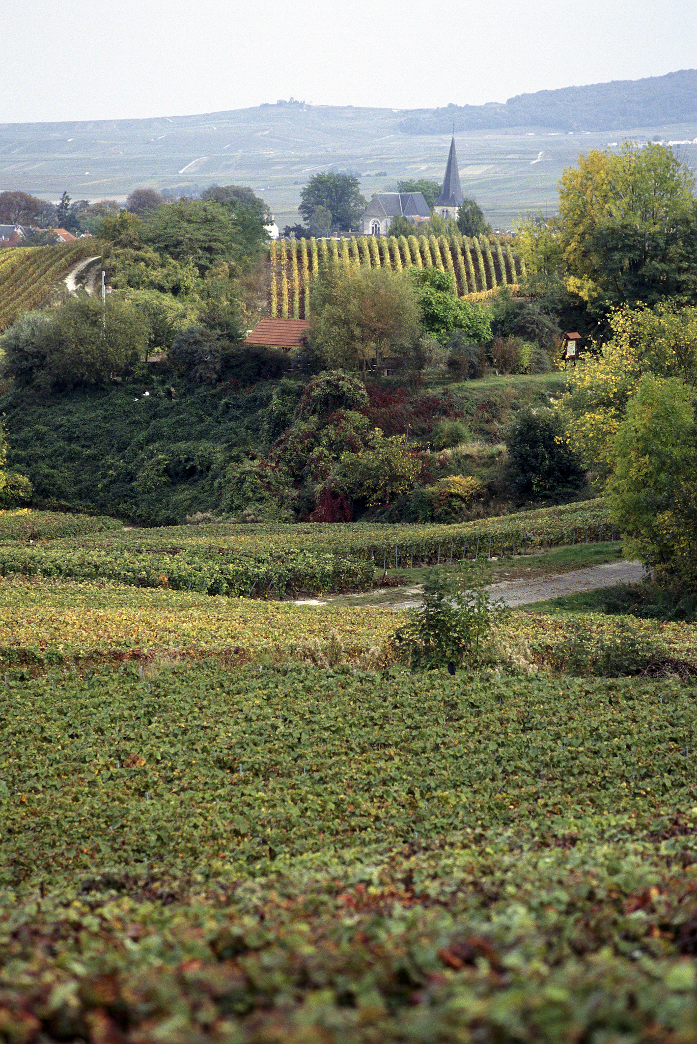 INRA, Jean Weber